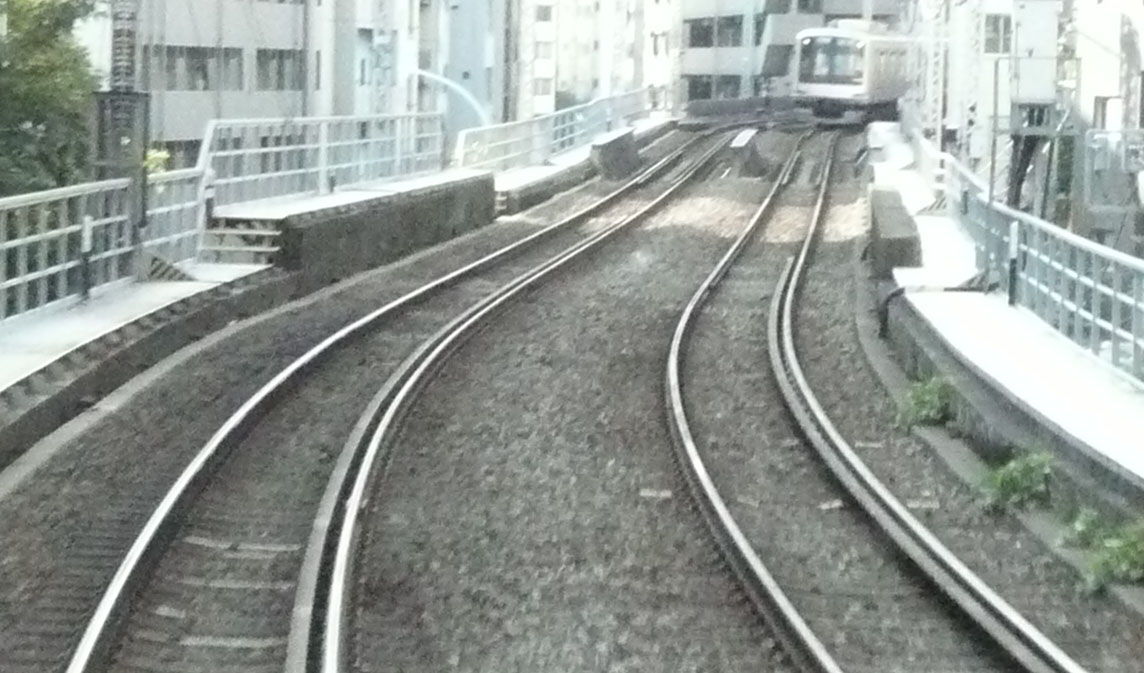 並木橋駅跡付近（下り電車の車内から撮影）